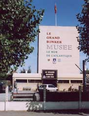 musée du mur de l'atlantique